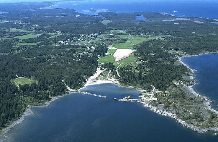 Motiv: Holmöns by Nyckelord: Flygbilder, Riksintressen Kategori: Kust- och skärgårdsmiljöHolmöns by